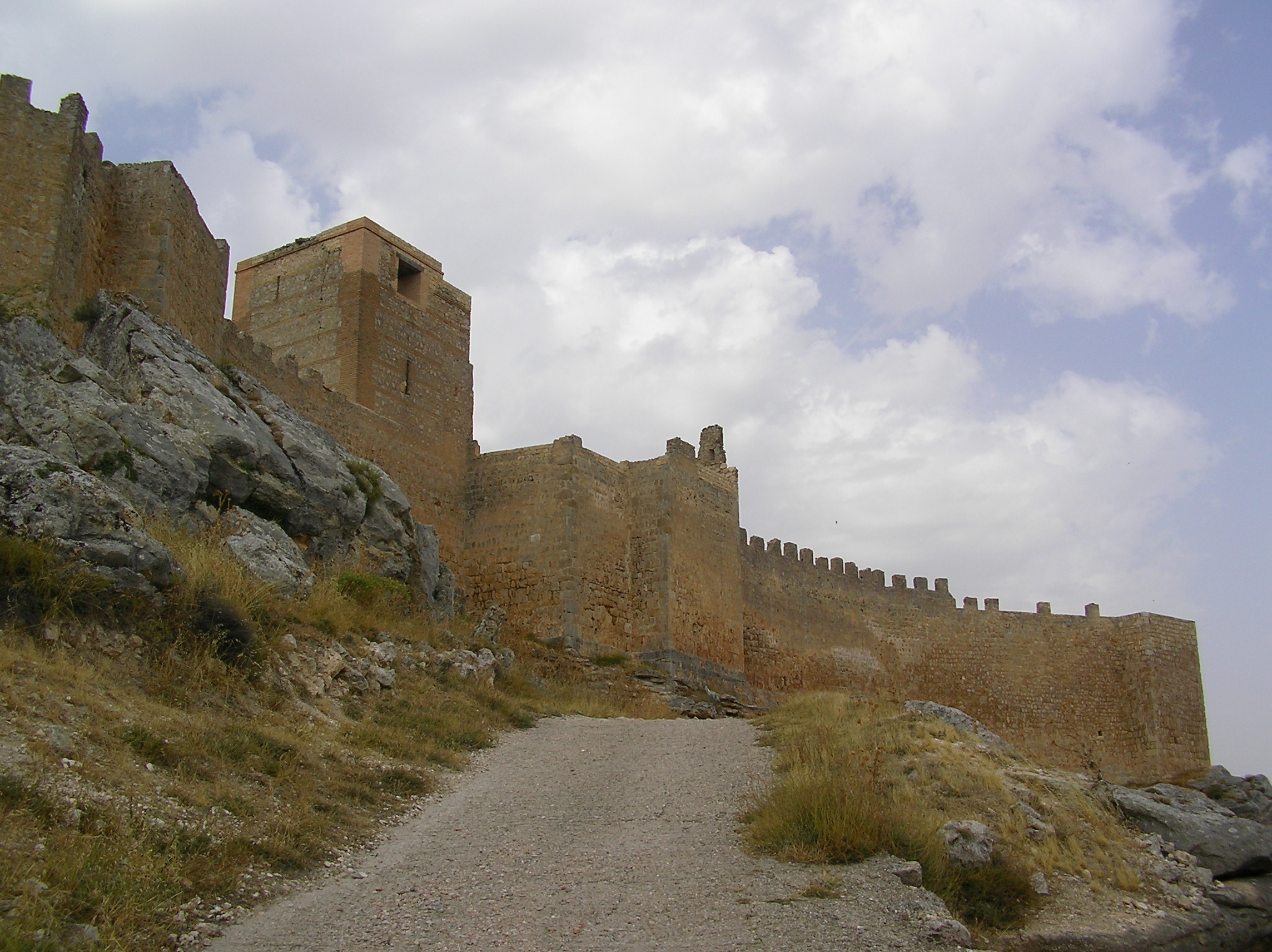 Castillo de Gormaz (Soria) / Gormaz castle (Soria, Spain)